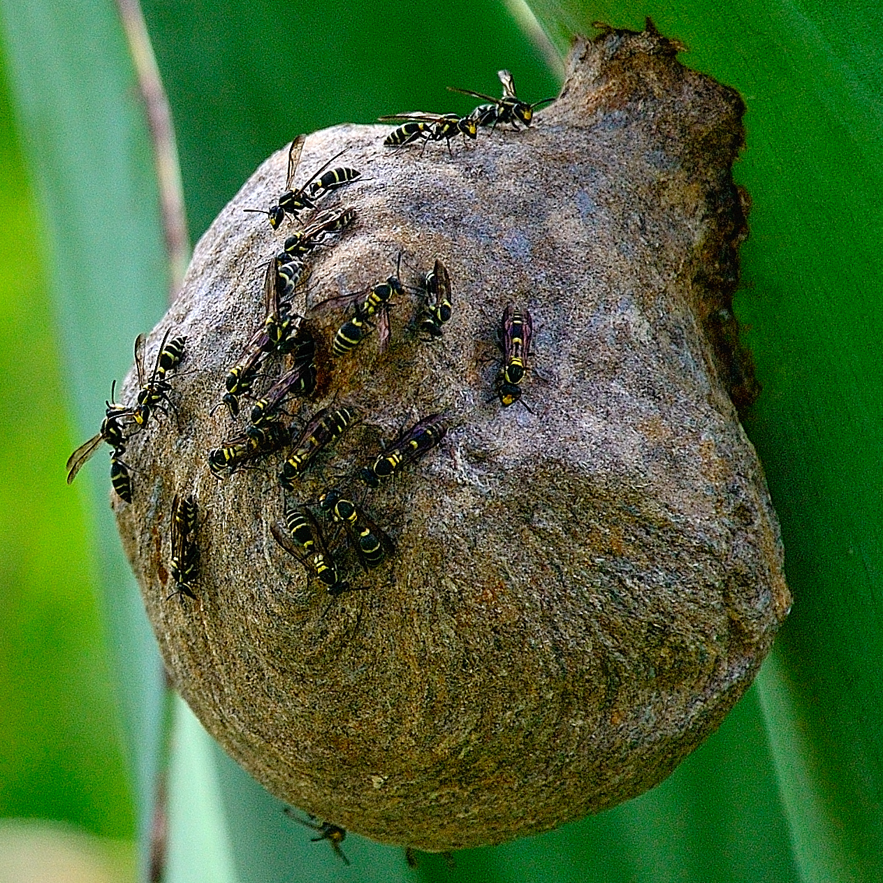 Nido de avispas, posiblemente del género Polybia. Fotografiado en el sendero de interpretación ecológica de la Facultad de Agronomía, Universidad Central de Venezuela, Maracay. Publicación original